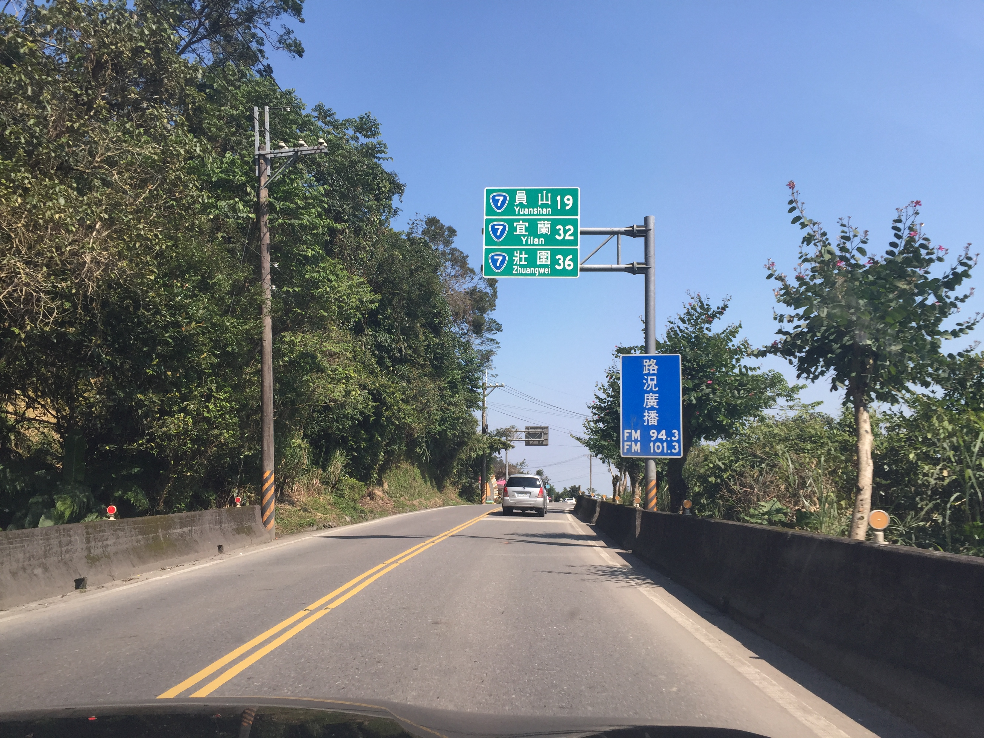 中文（台灣）: 台7線 宜蘭圓山泰雅路二段路段